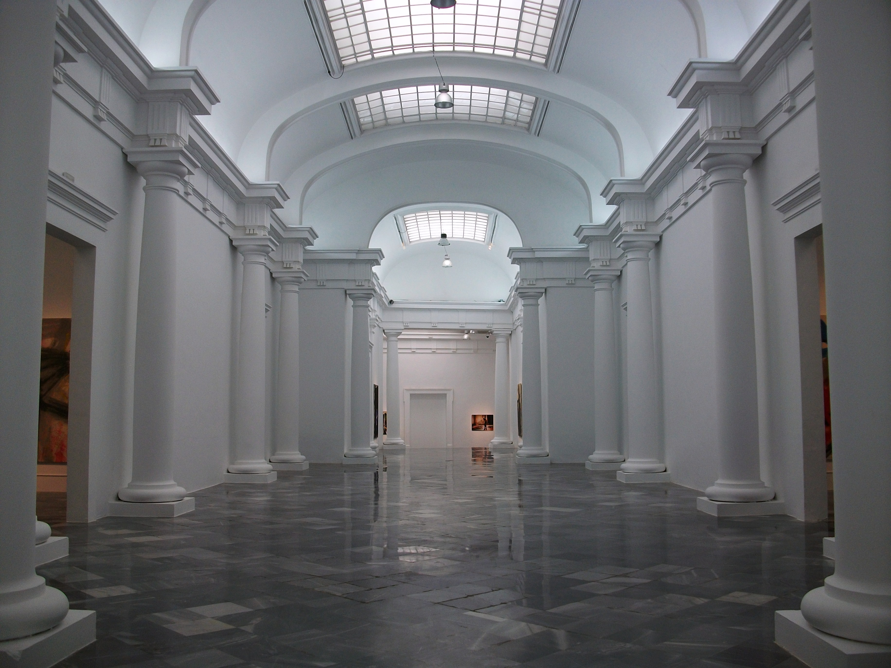 Sala Ferreres del centre del Carme de València.